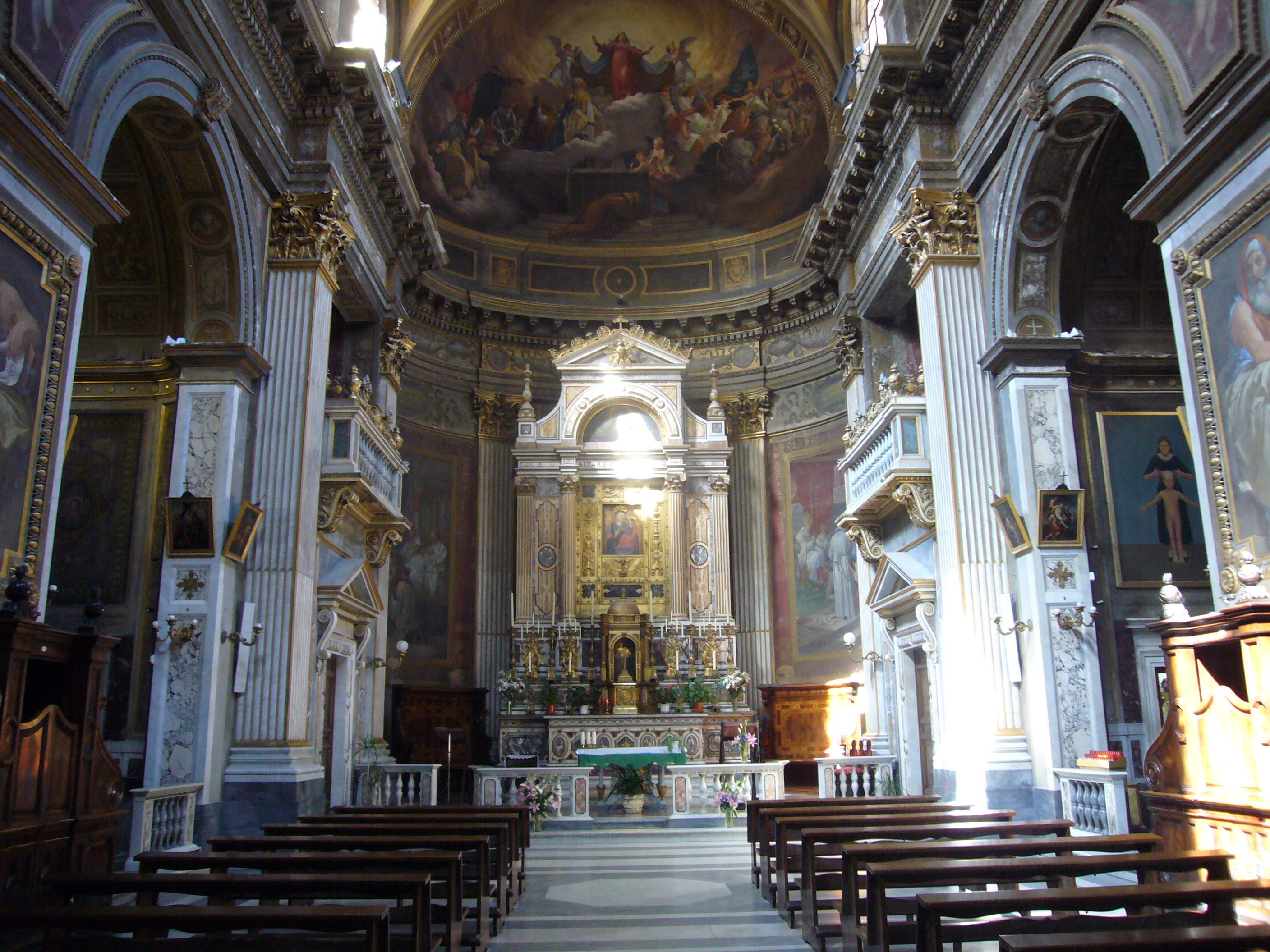 Roma, santa Lucia del Gonfalone, interno